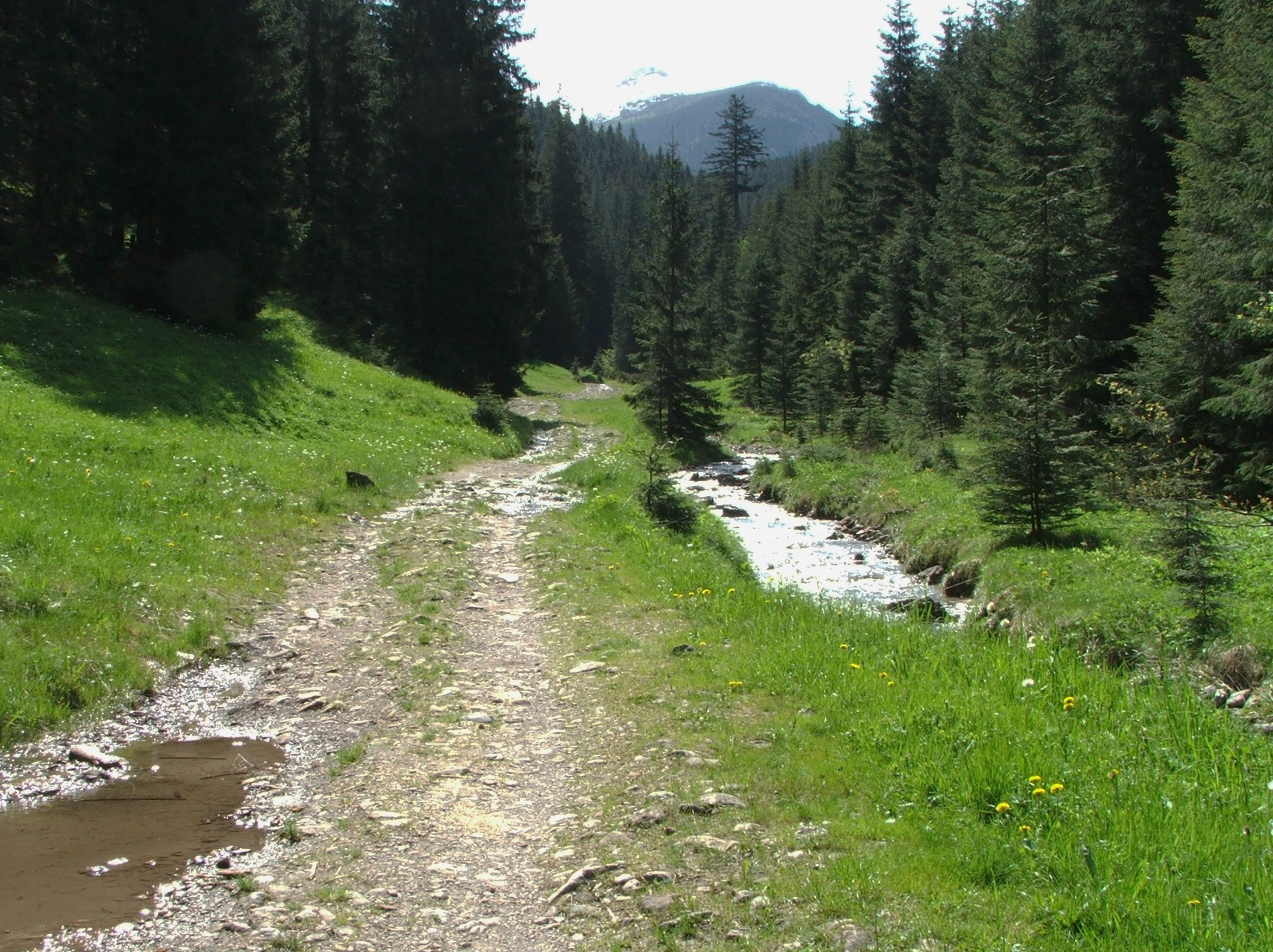 Dolina Lejowa w Tatrach